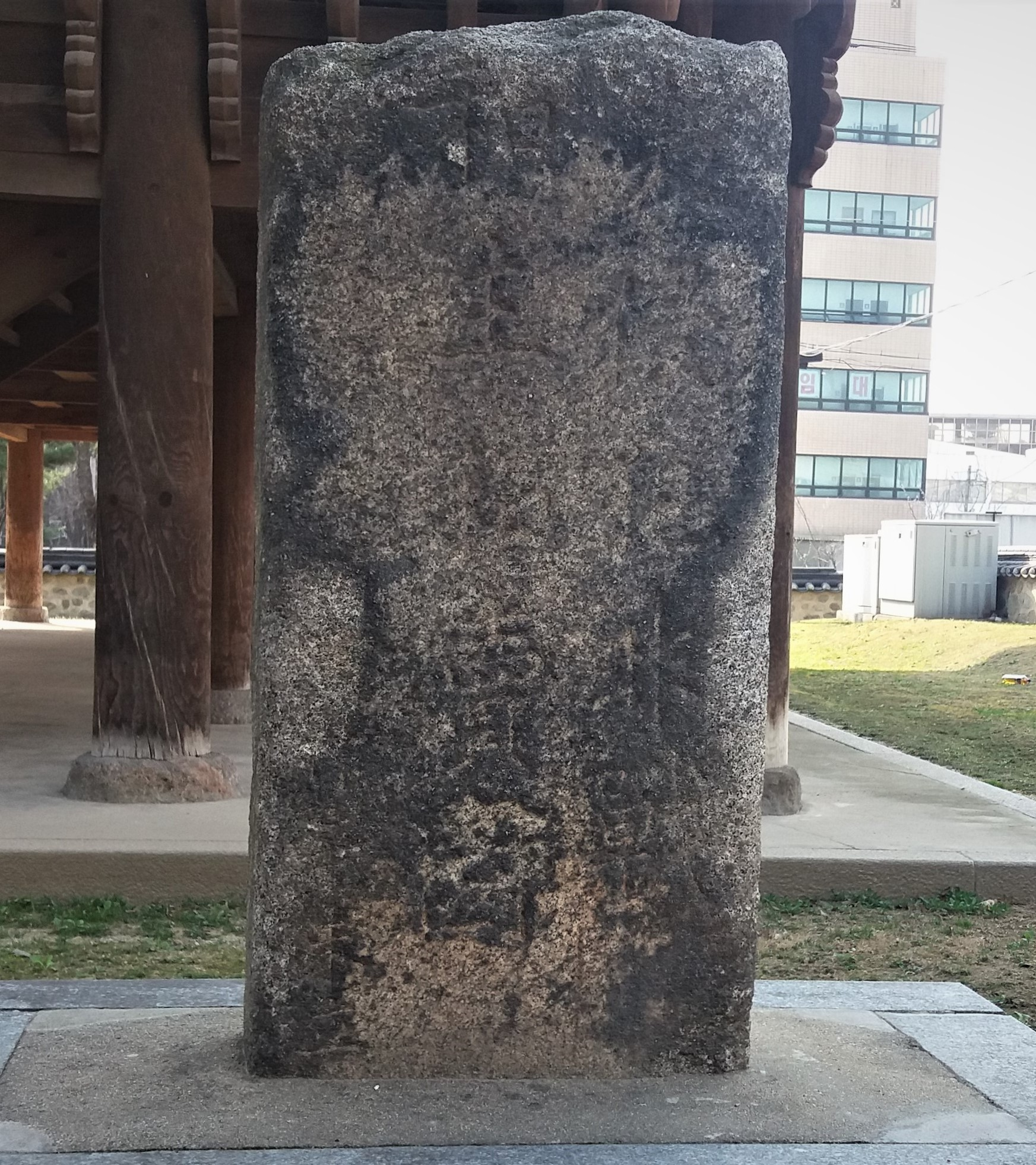 斥和碑（1871年建立、全州）